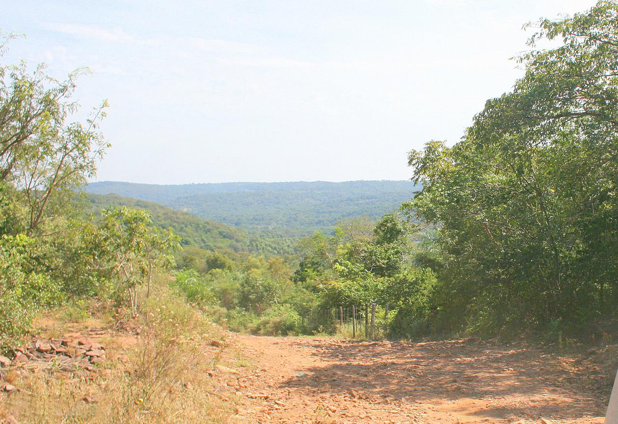 Cordillera de los Altos, departamento de la Cordillera, Paraguay.